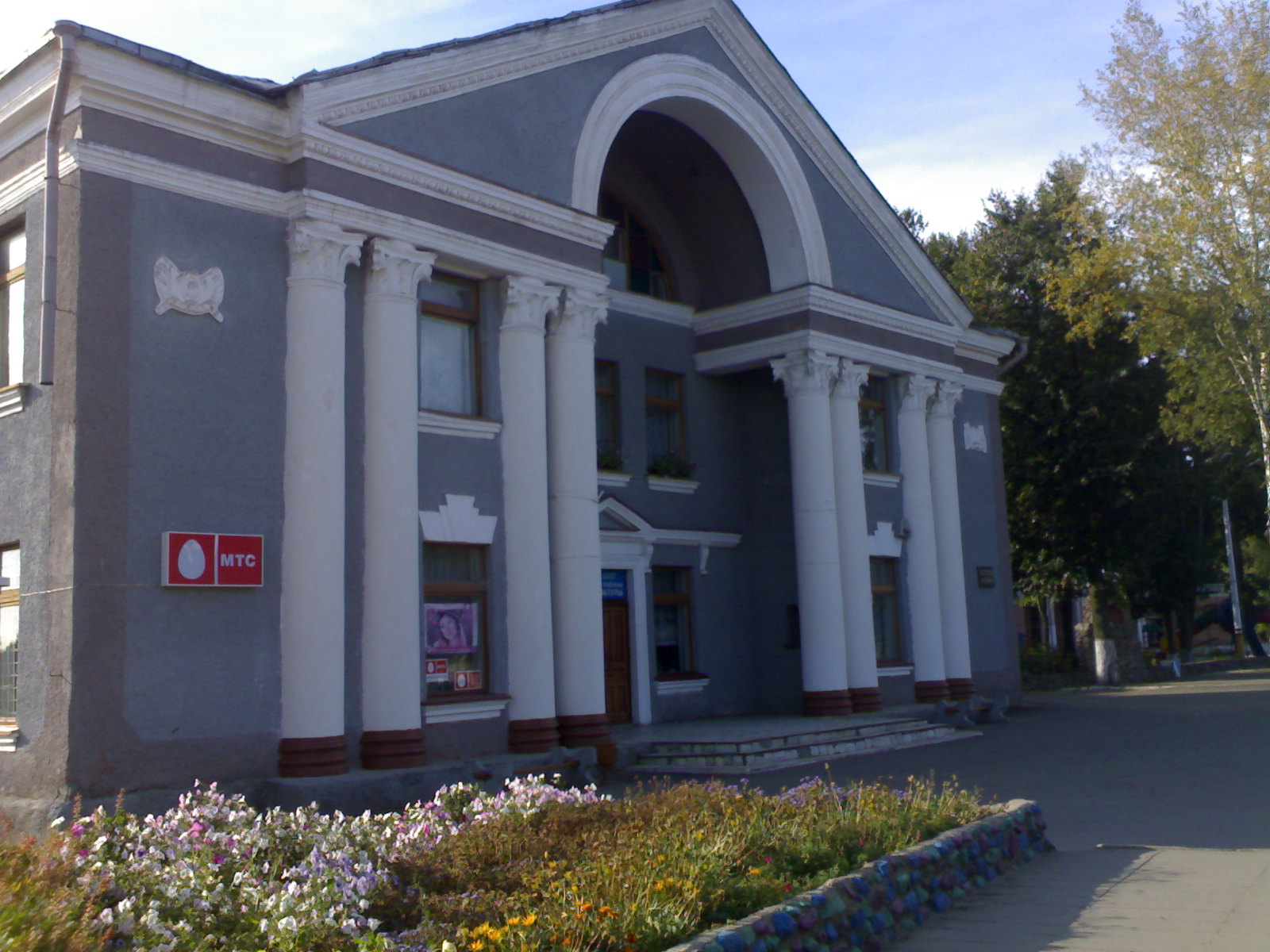 Беларуская (тарашкевіца): Лёзна. Дом культуры